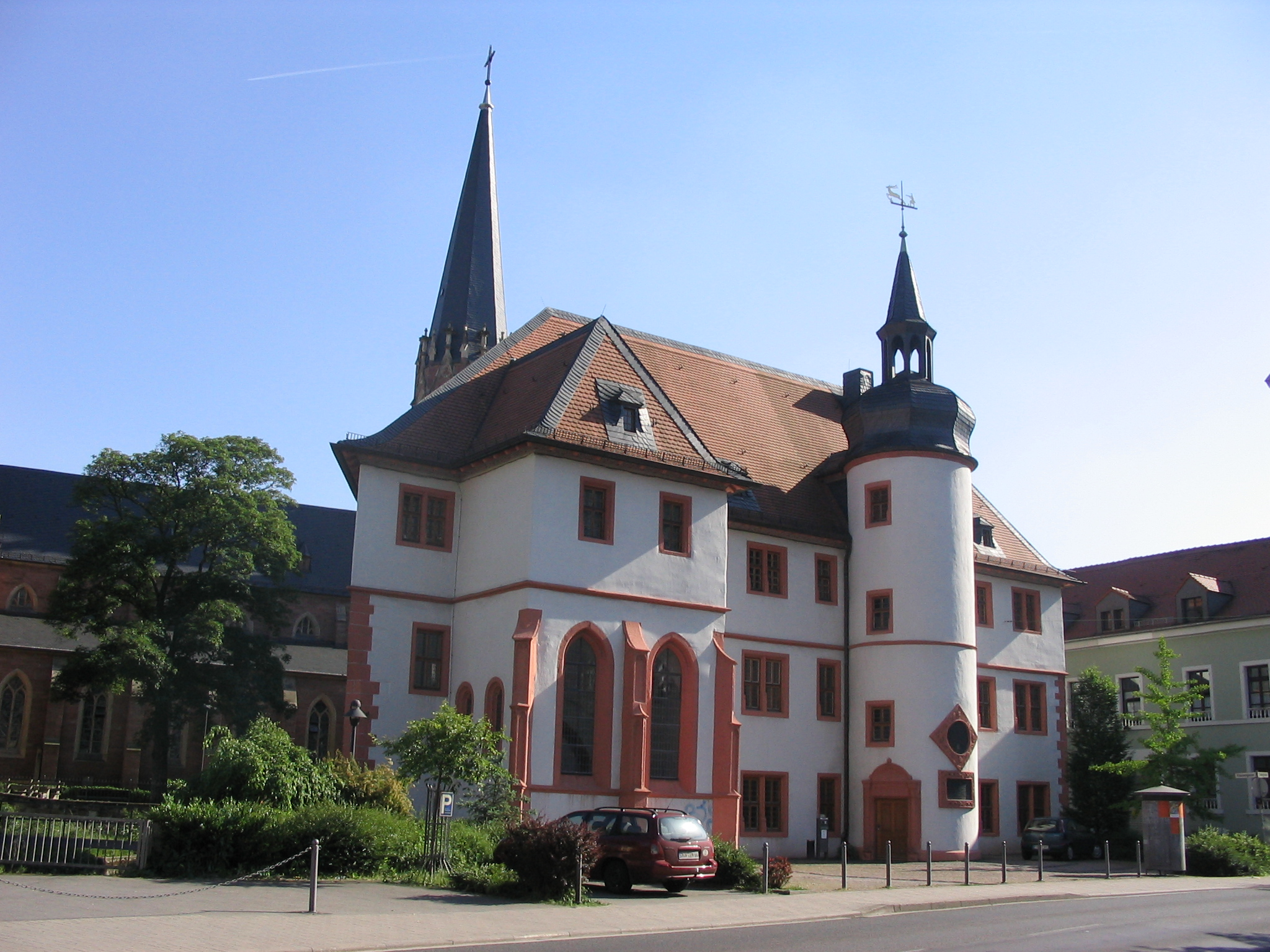 selbst fotografiert Datum: 29.05.2005